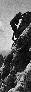 Paul Preuß esclant